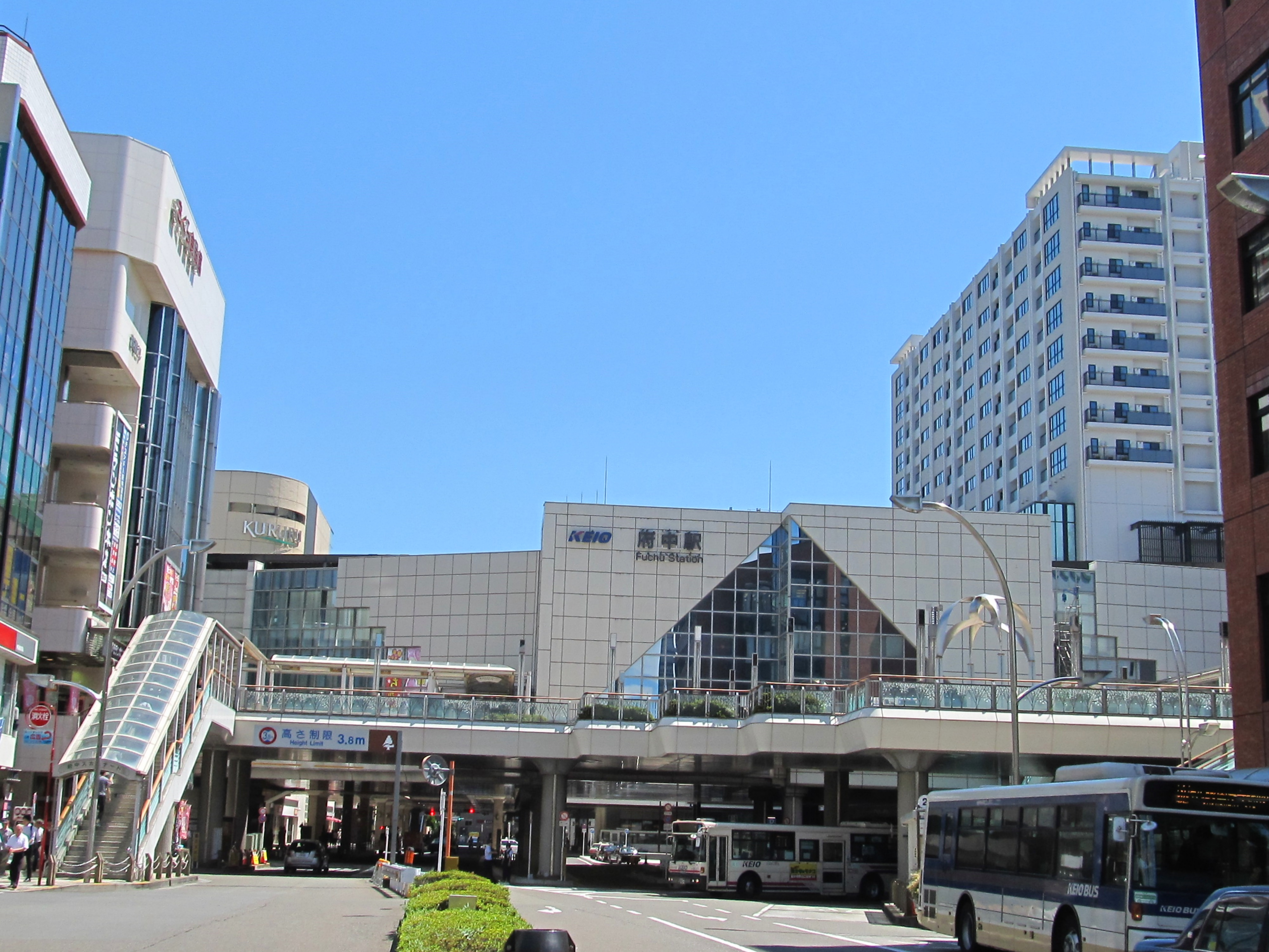 京王線府中駅北口周辺